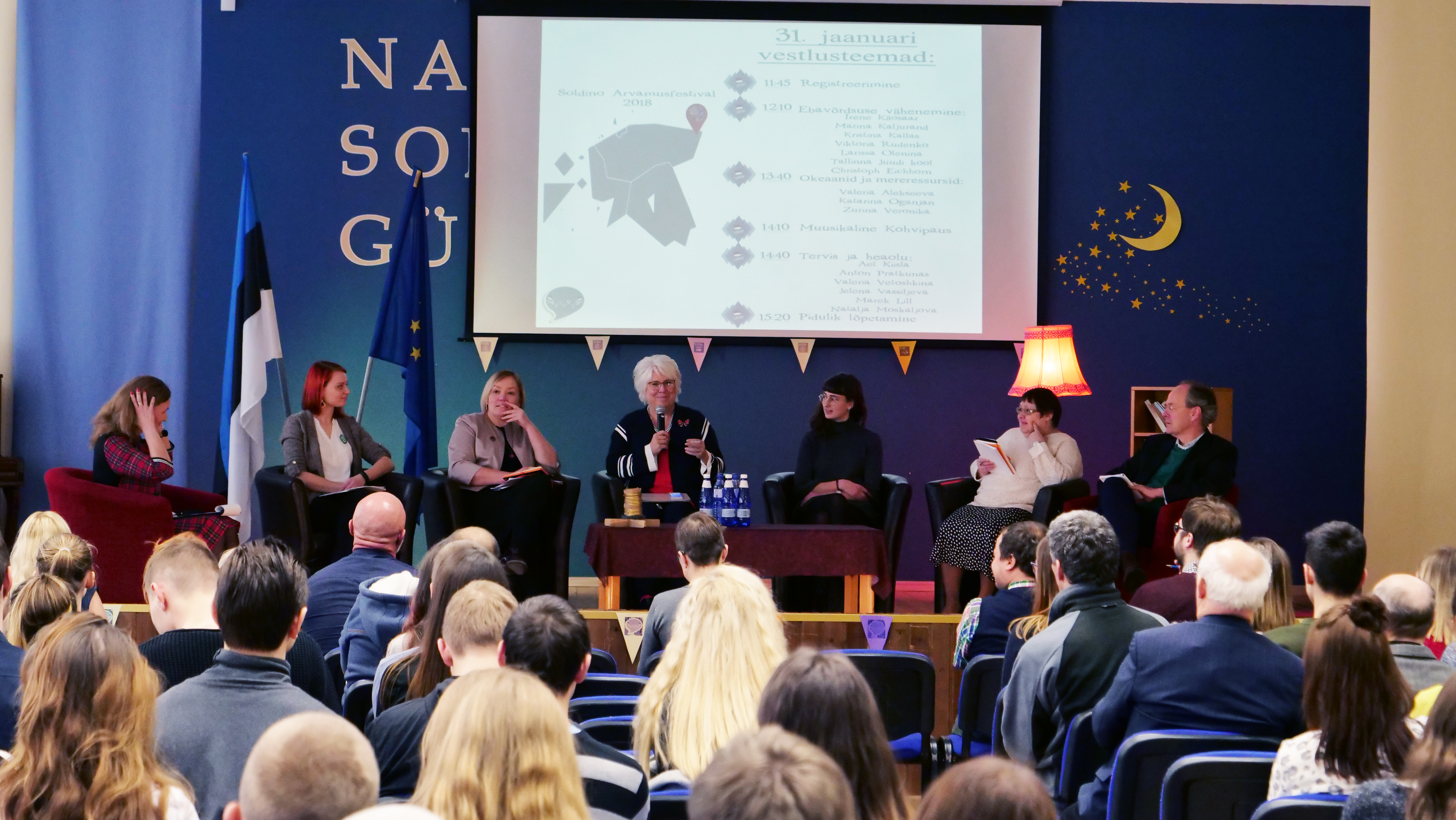 üritus 2018